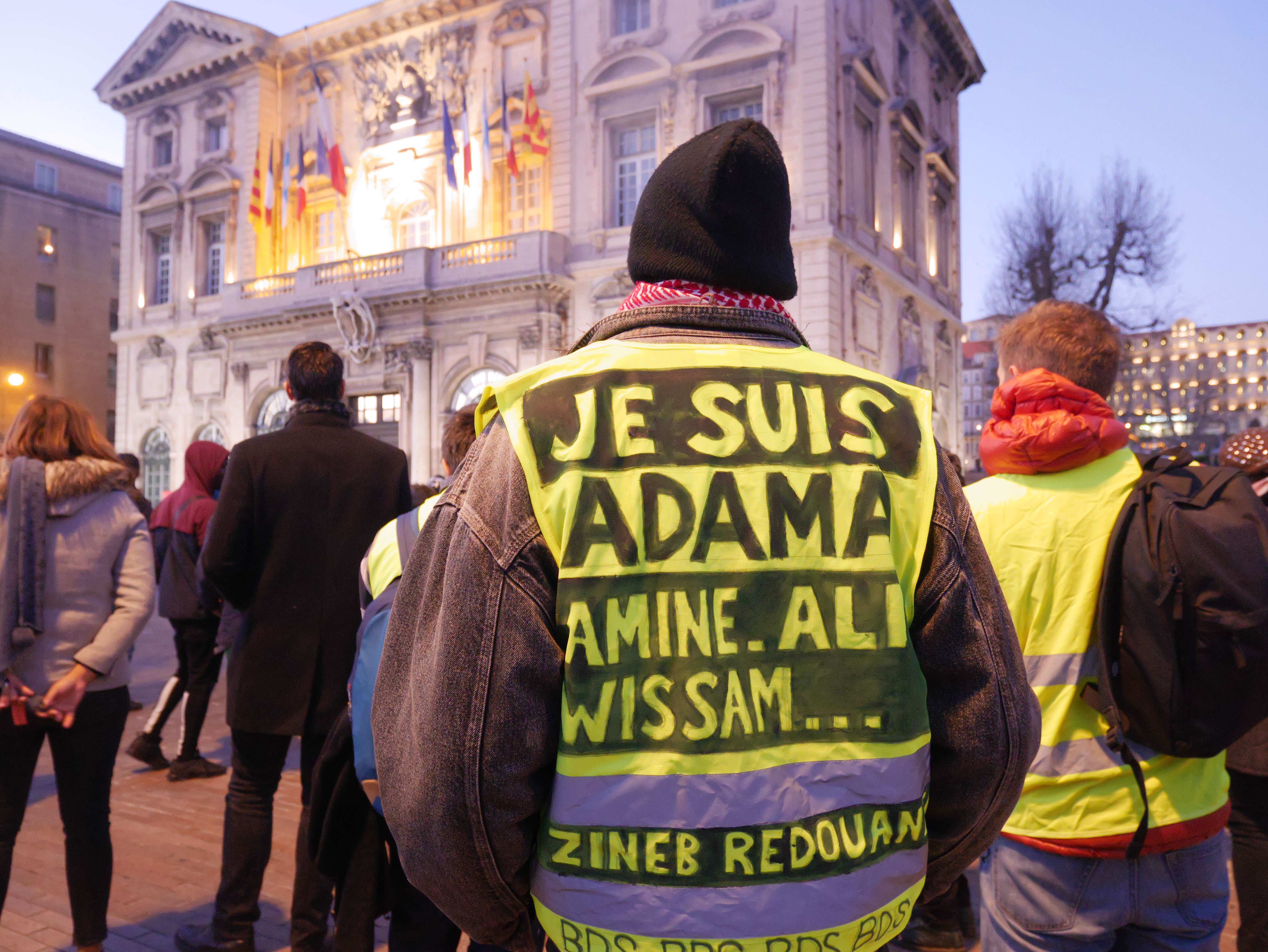 12 janvier 2019, face à la Mairie de Marseille Adama Traoré, Amine Bentounsi Ali Ziri, Wissam El Yamni, Lamine Dieng, Mehdi Bouhouta, Hocine Bourras, Amadou Koumé, Abdoulaye Camara, Babacar Gueye, Morad Touat, Lahoucine Ait-Omghar et tant d’autres… Tous assassinés par la police Tout comme Zineb Redouane, octogénaire marseillaise, décédée après un tir de grenade lacrymogène lors de la manifestation du 1er décembre à Marseille